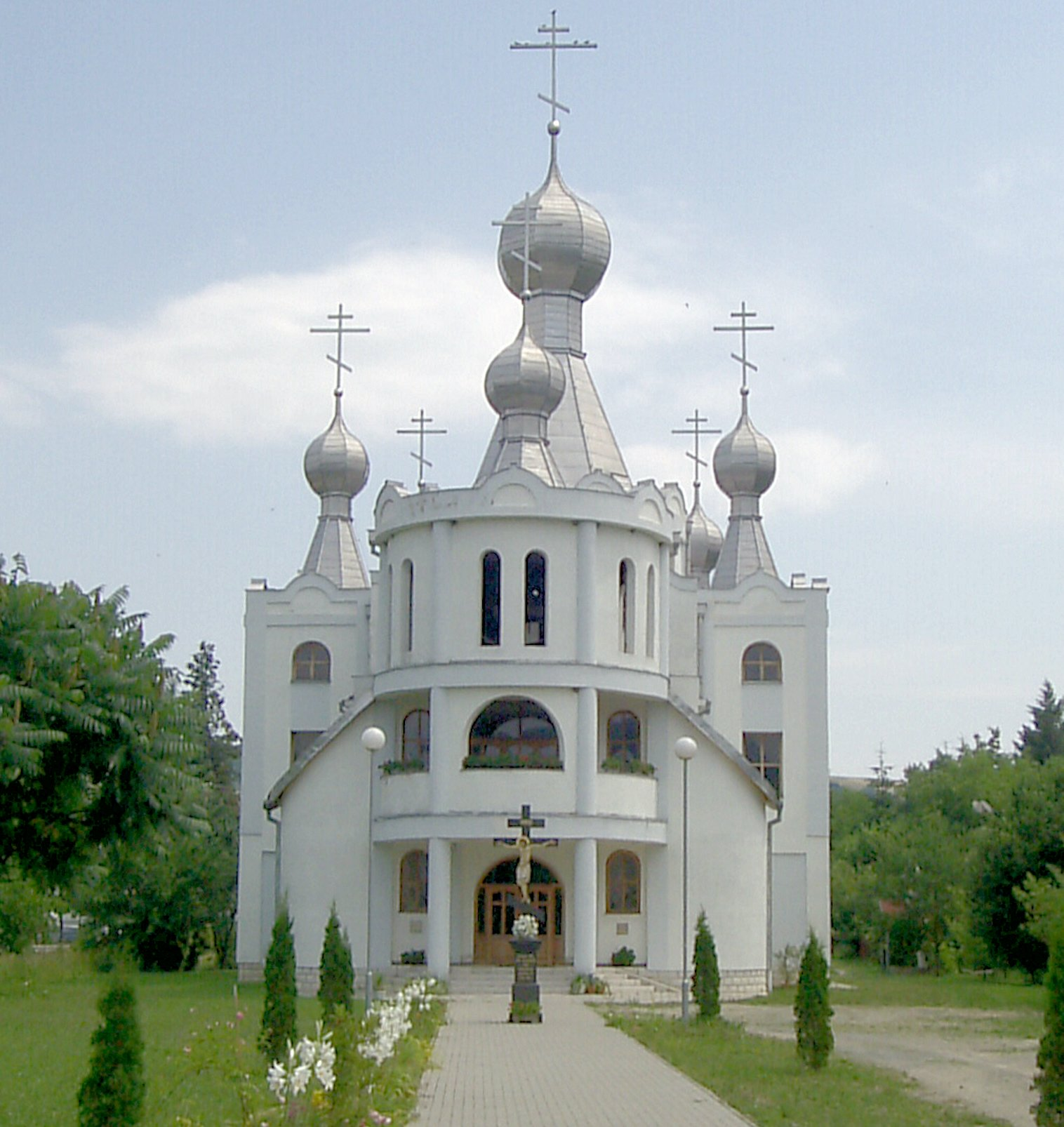 Pravoslavny chrám Stropkov